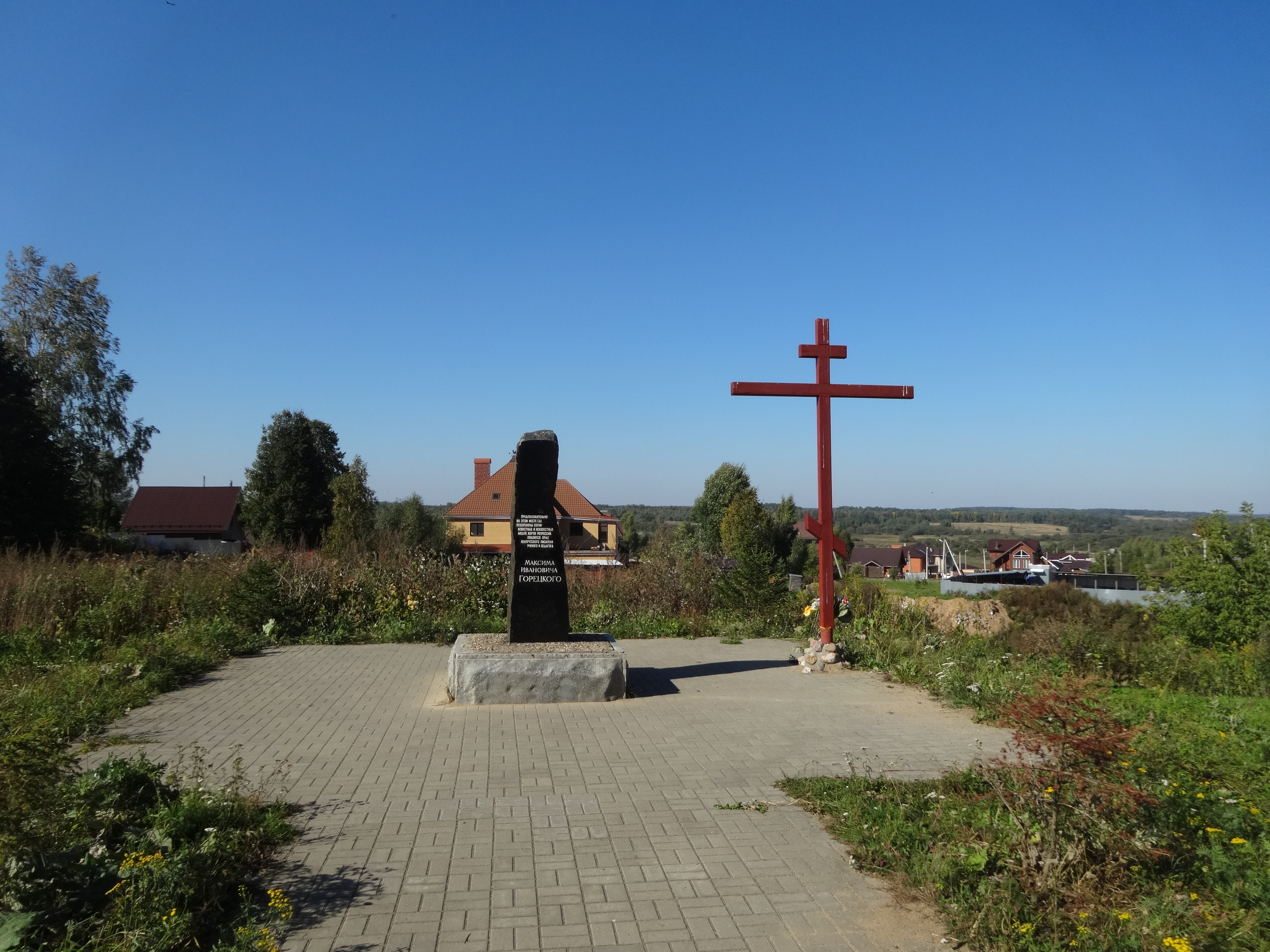 Памятный знак М.И.Горецкому и жертвам политических репрессий является памятником истории местного значения